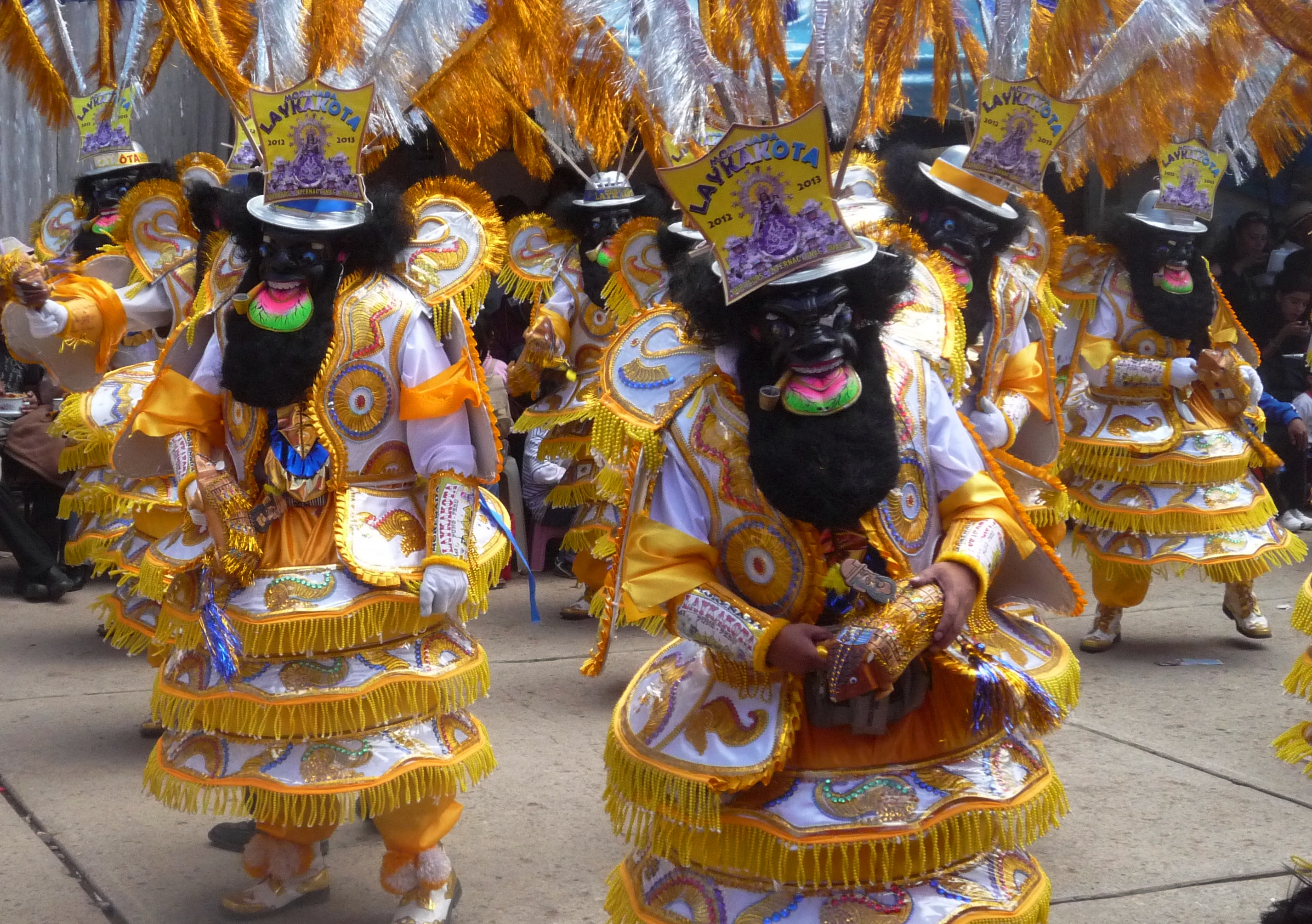 Candelaria Puno 2014